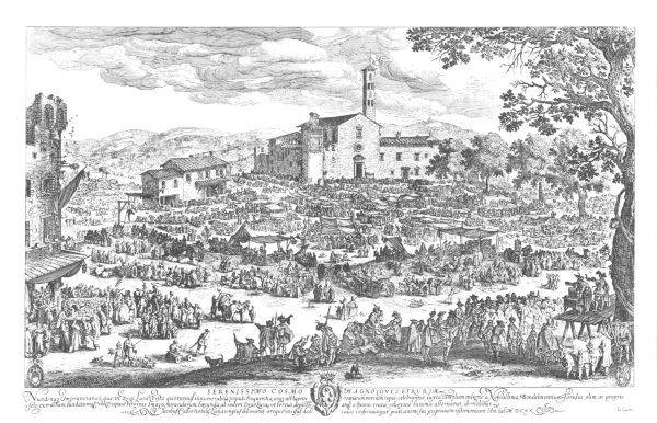 Jacques Callot (Nancy, 1592 - 1635), La Fiera dell'Impruneta, Acquaforte originale: mm 436 x 678